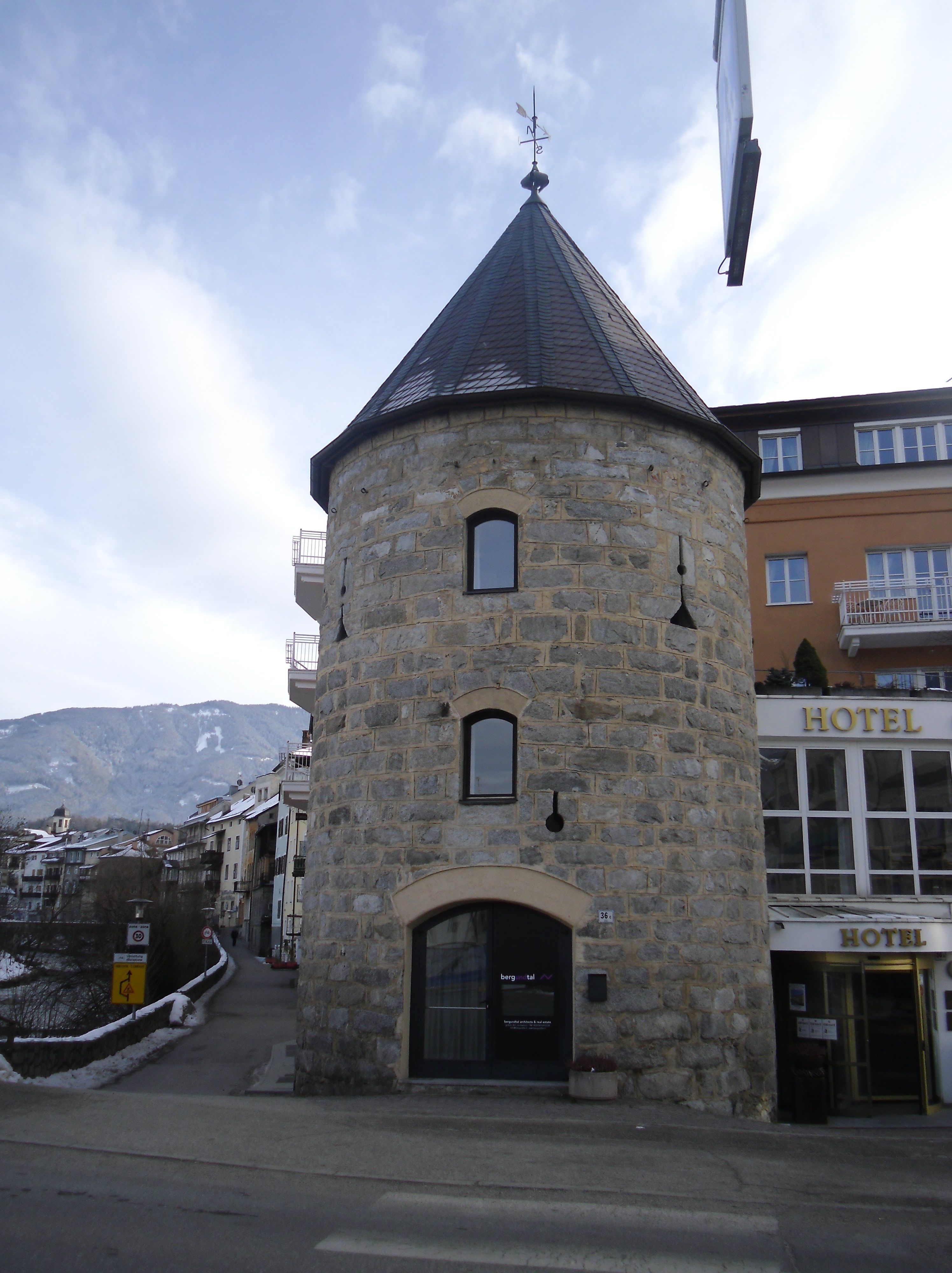 Stadtturm in Bruneck